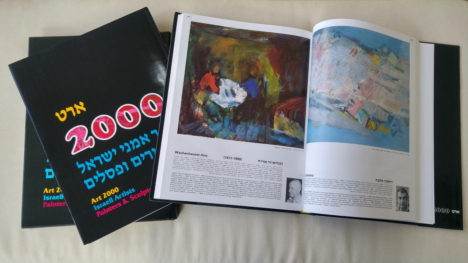 עמודים בארט 2000